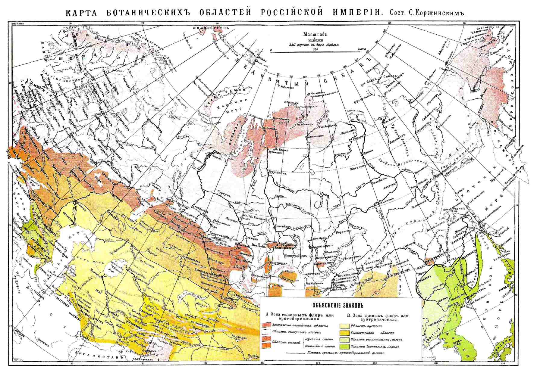 Карта ботанических областей Российской империи, составленная Коржинским С. И.